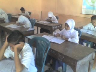 Siswa MI Tarbiyatusy Syubban Kalimulyo, Jakenan, Pati